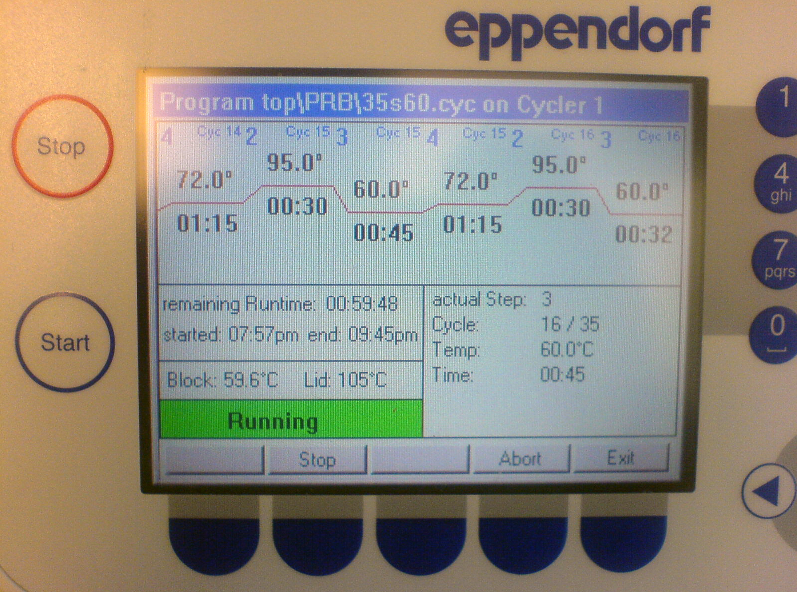 Detailaufnahme, Thermocycler-Display mit Verlaufsanzeige des laufenden PCR-Programms